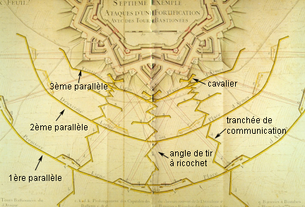 Technique d'attaque des places par le système de tranchées parallèles et les cavaliers de tranchées. "septième example d'attaques d'une fortification avec des tours bastionnées".